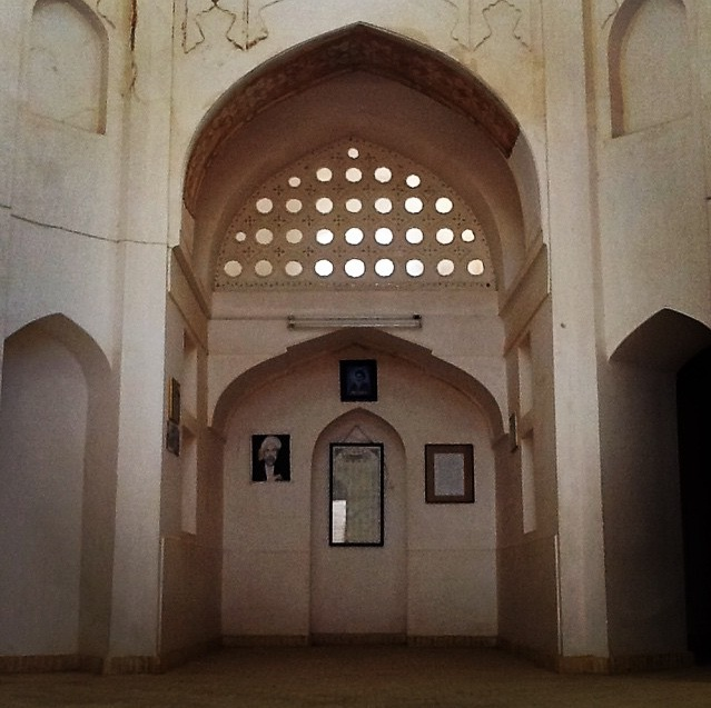 This is a view of the inside of an old house in a village called Kahak (near the city of Qom, Iran) where Mulla Sadra used to live in when he was exiled due to some of his ideas. A copy of the painted portrait of Mulla Sadra is hanged on the wall.